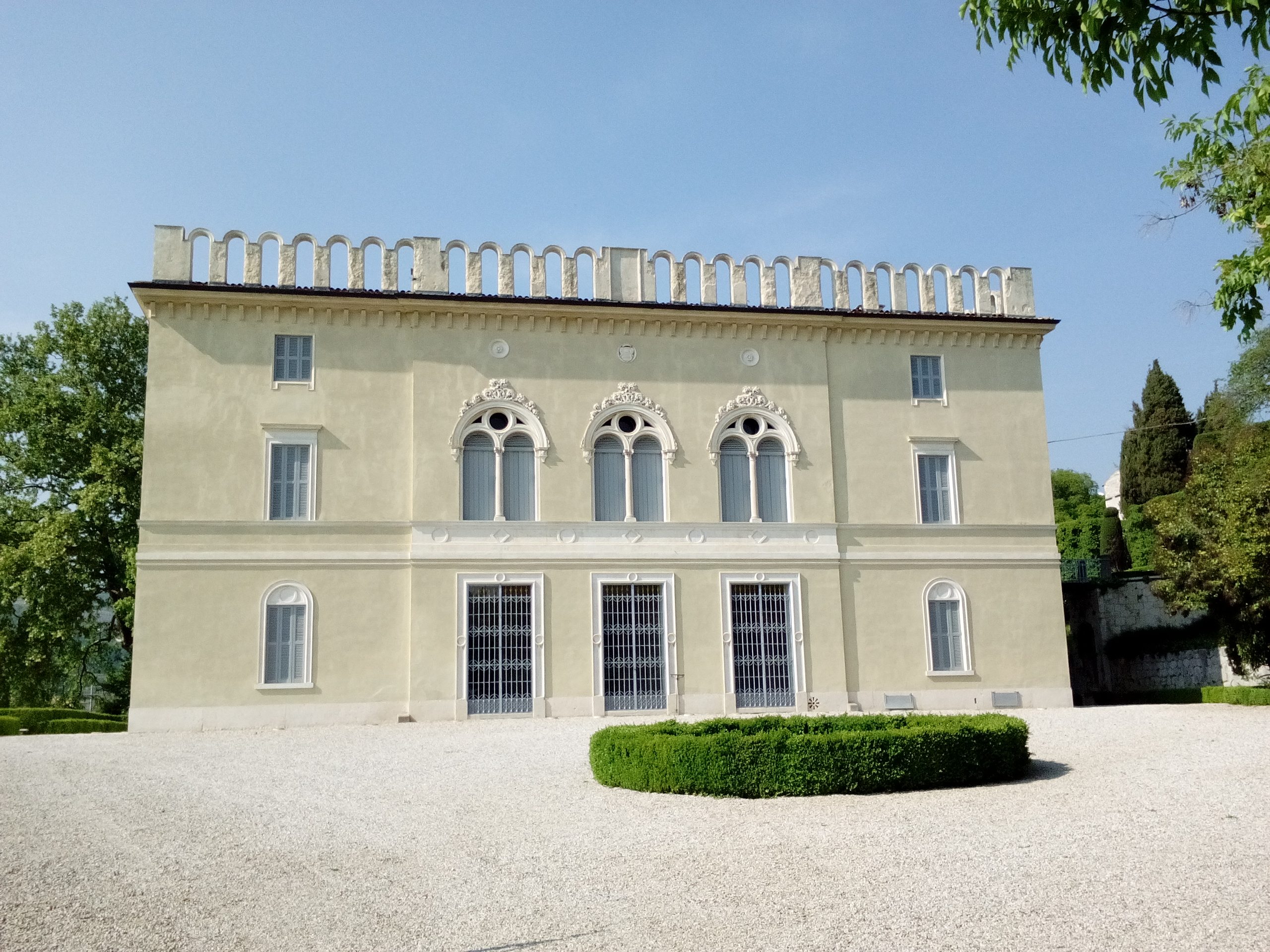 Facciata di villa Rizzardi del XIX secolo a Negrar, provincia di Verona